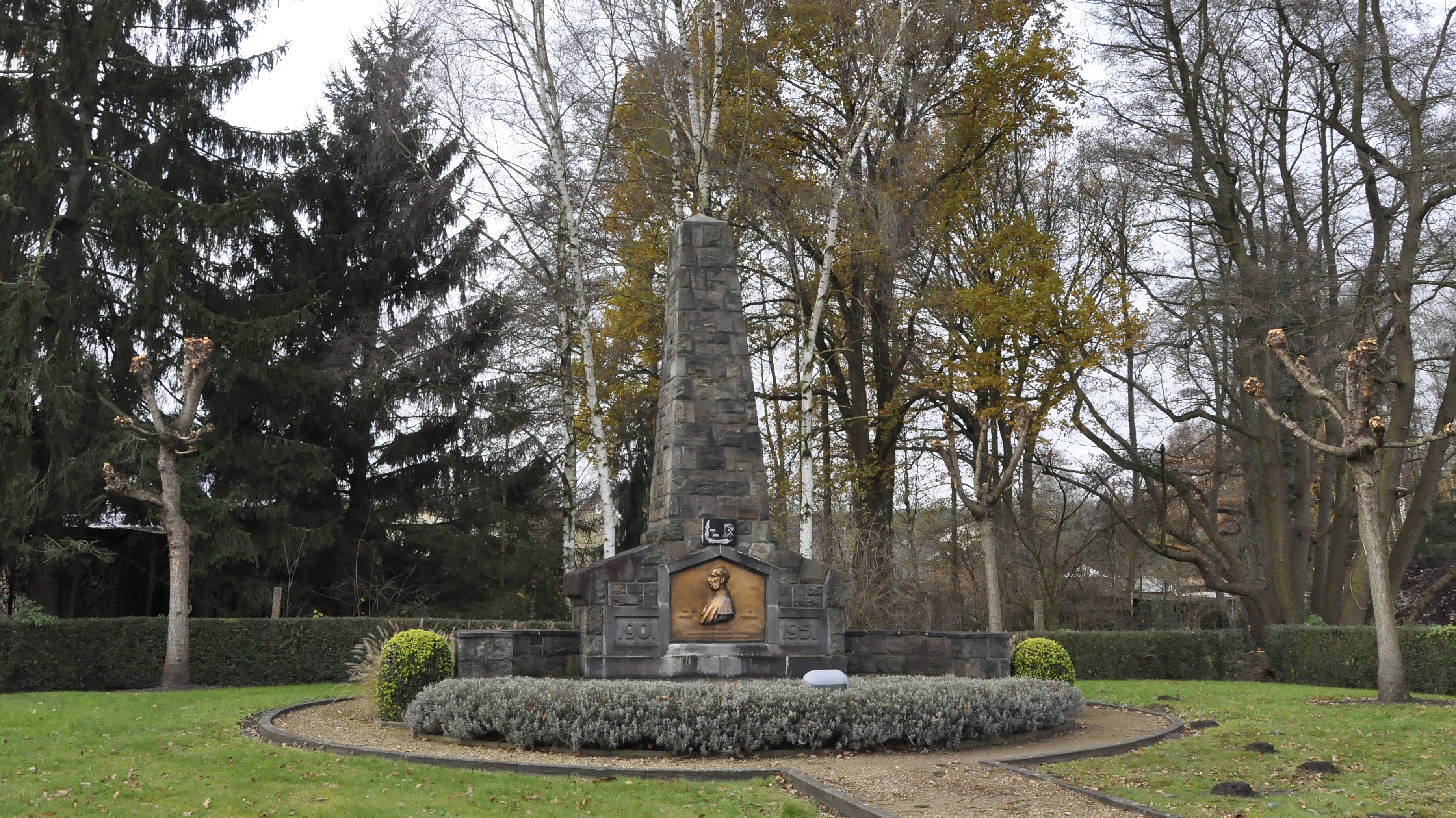 As - André Dumont-monument 6-12-2014 This photo of immovable heritage has been taken in the Flemish Region